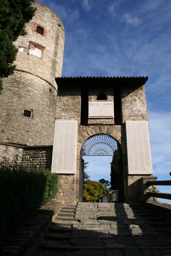 L'ingresso alla Rocca di Bergamo. Fotografia di Giorces.